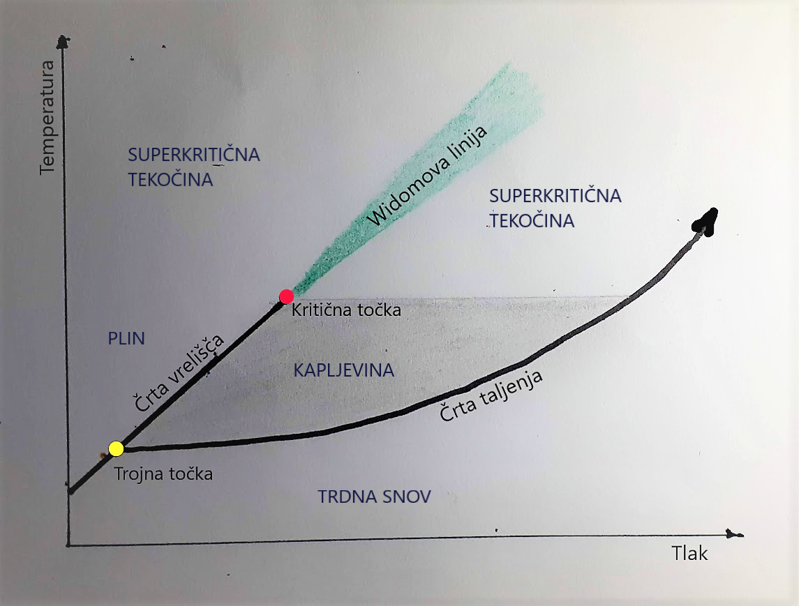 Fazni diagram prikazuje agregatna stanja snovi in prehode med njimi. Superkritična tekočina se pojavi nad kritično točko, na obeh starneh Widomove črte.